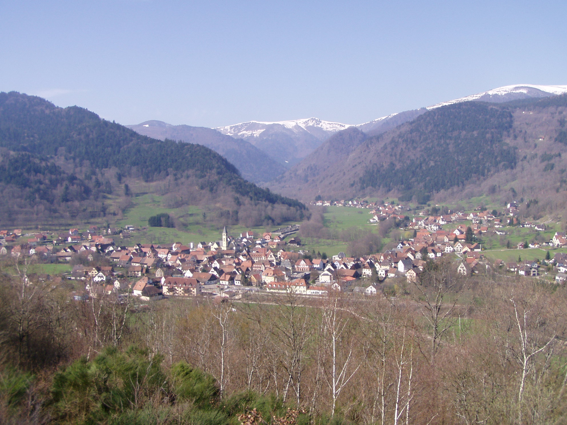 Metzeral, Alsace, France